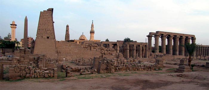 Luksor - panorama